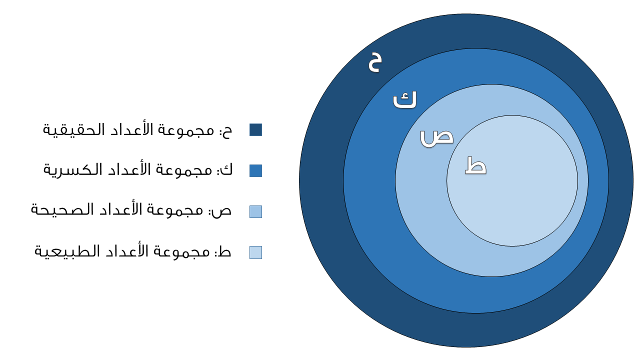 صورة توضح مجموعات الأعداد في الرياضيات